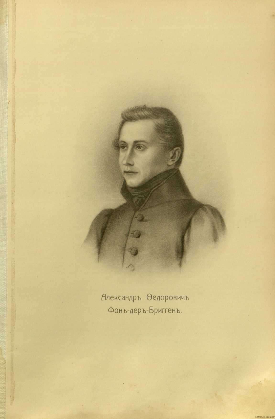 Головачев, П. М. Декабристы : 86 портретов, вид Петровского завода и 2 бытовых рисунка того времени. - М., [1906] Бриген, Александр Фёдорович